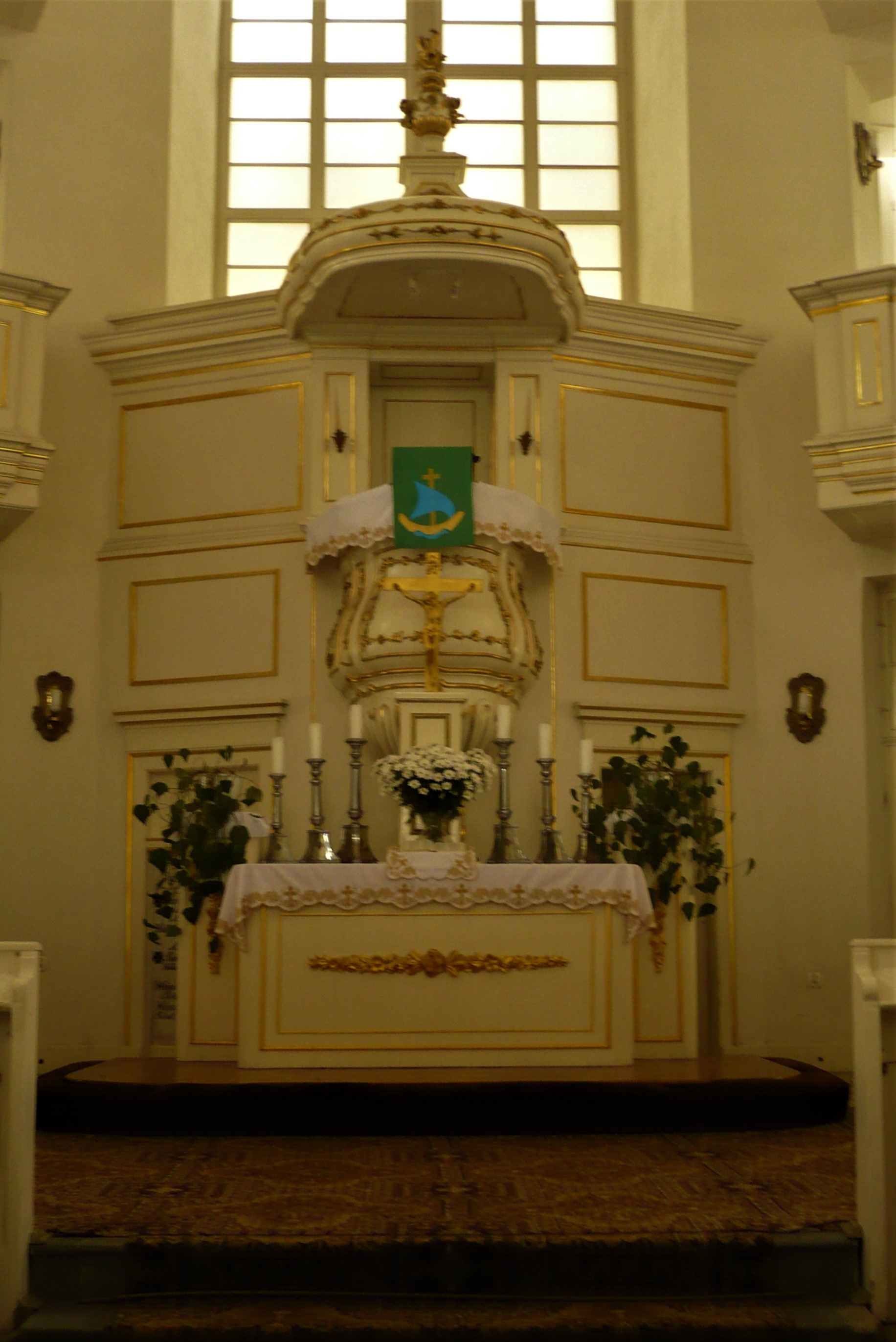 Kościół Opatrzności Bożej we Wrocławiu